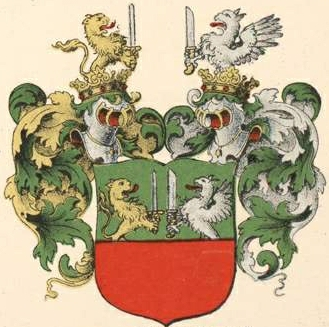 Edle von Rennenkampffi suguvõsa aadlivapp